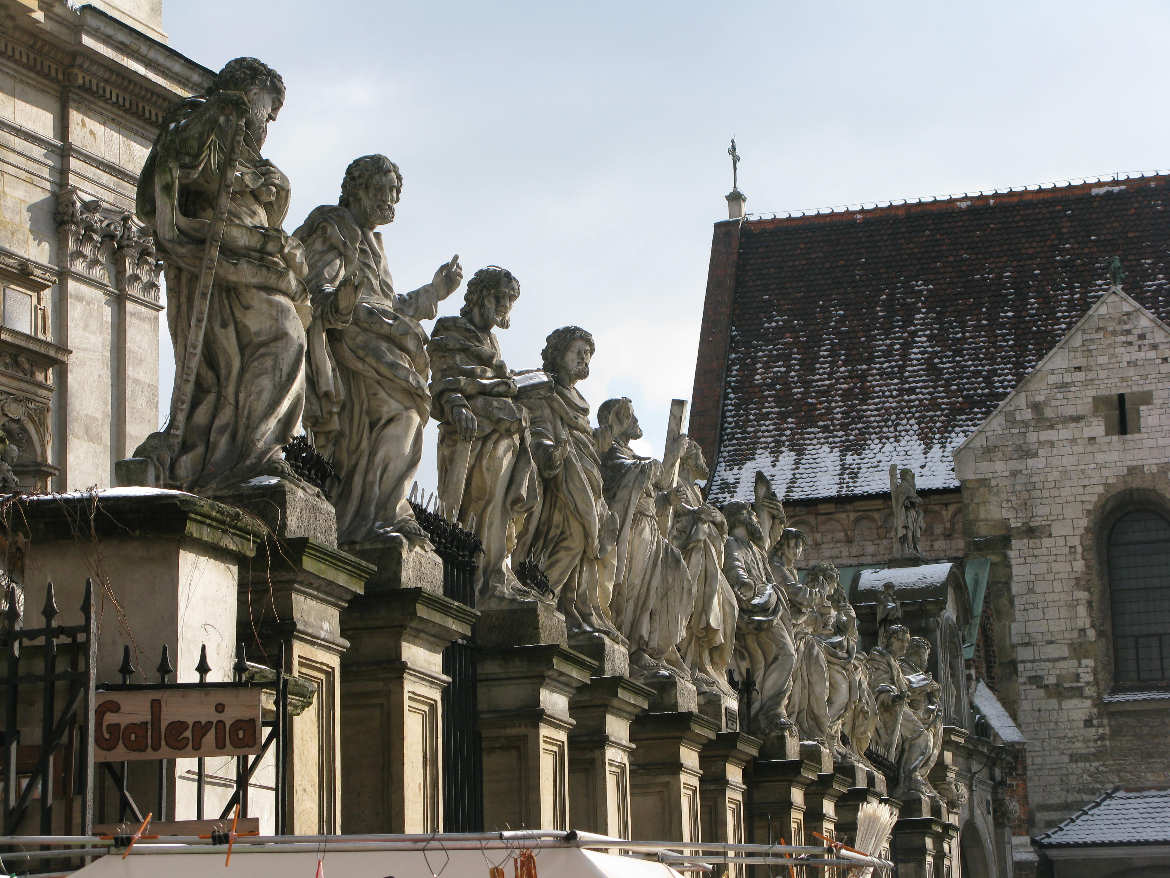 Kraków, kościół pw. śś. Piotra i Pawła, 1597-1619, XVIII